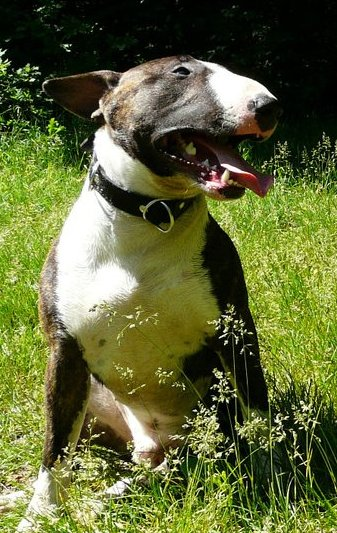 Dospělý pes anglického bulteriéra s průkazem původu, výška v kohoutku 55 cm, váha 34 kg.